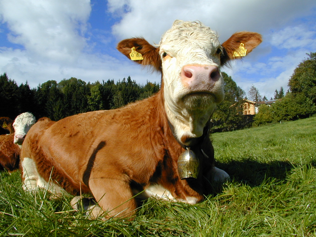 Kühe auf einer Weide in Oberbayern